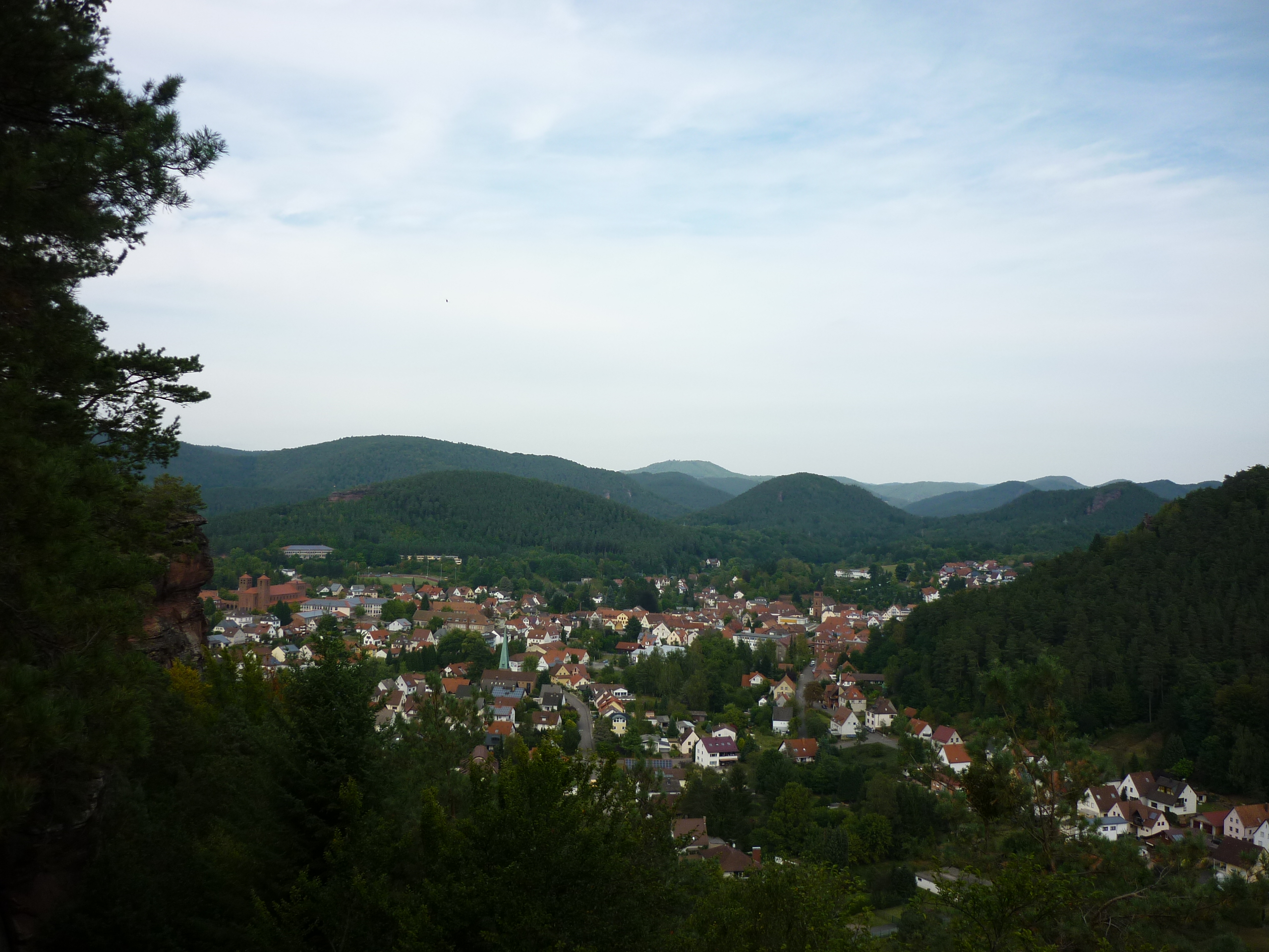 Ausblick auf Hauenstein vom Burghalder, 09.2012